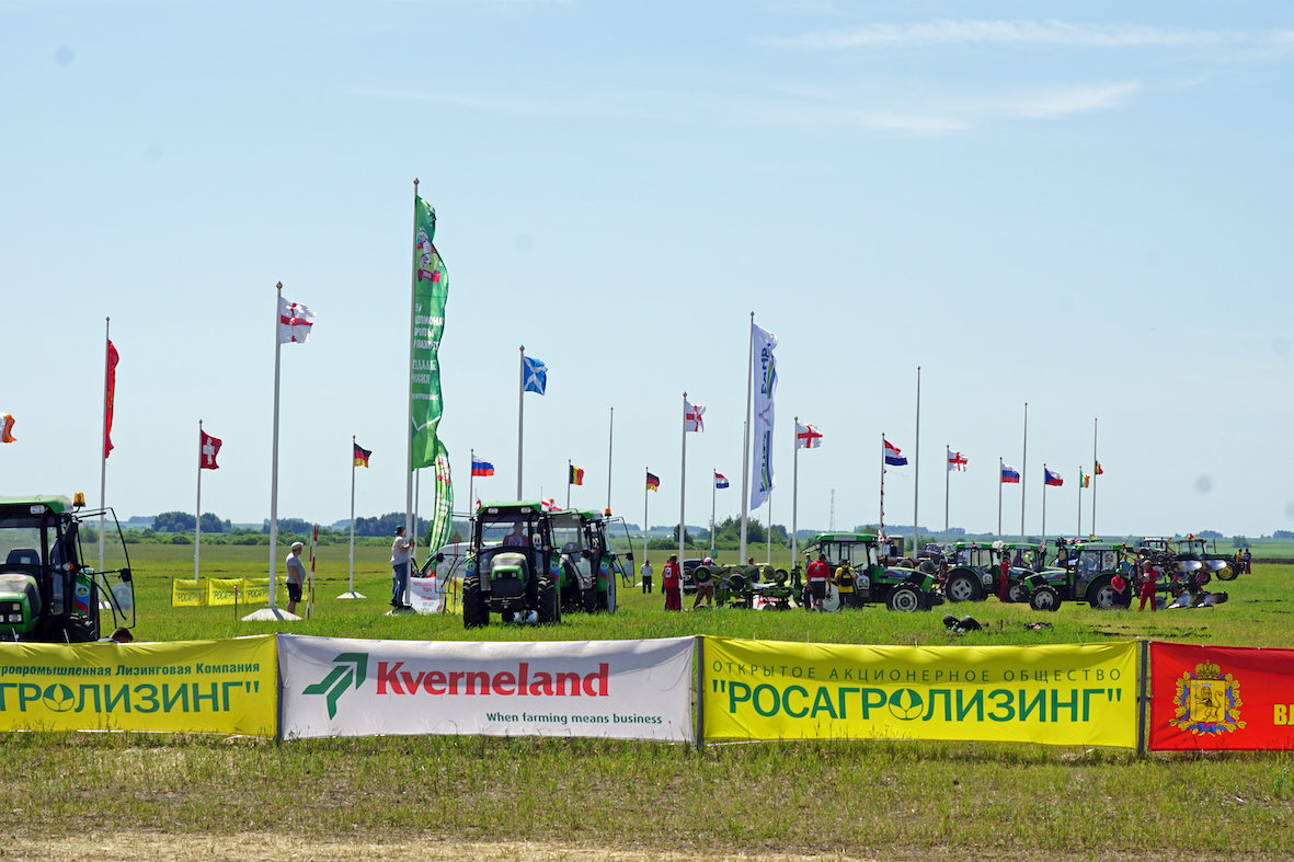 35-й Чемпионат Европы по пахоте